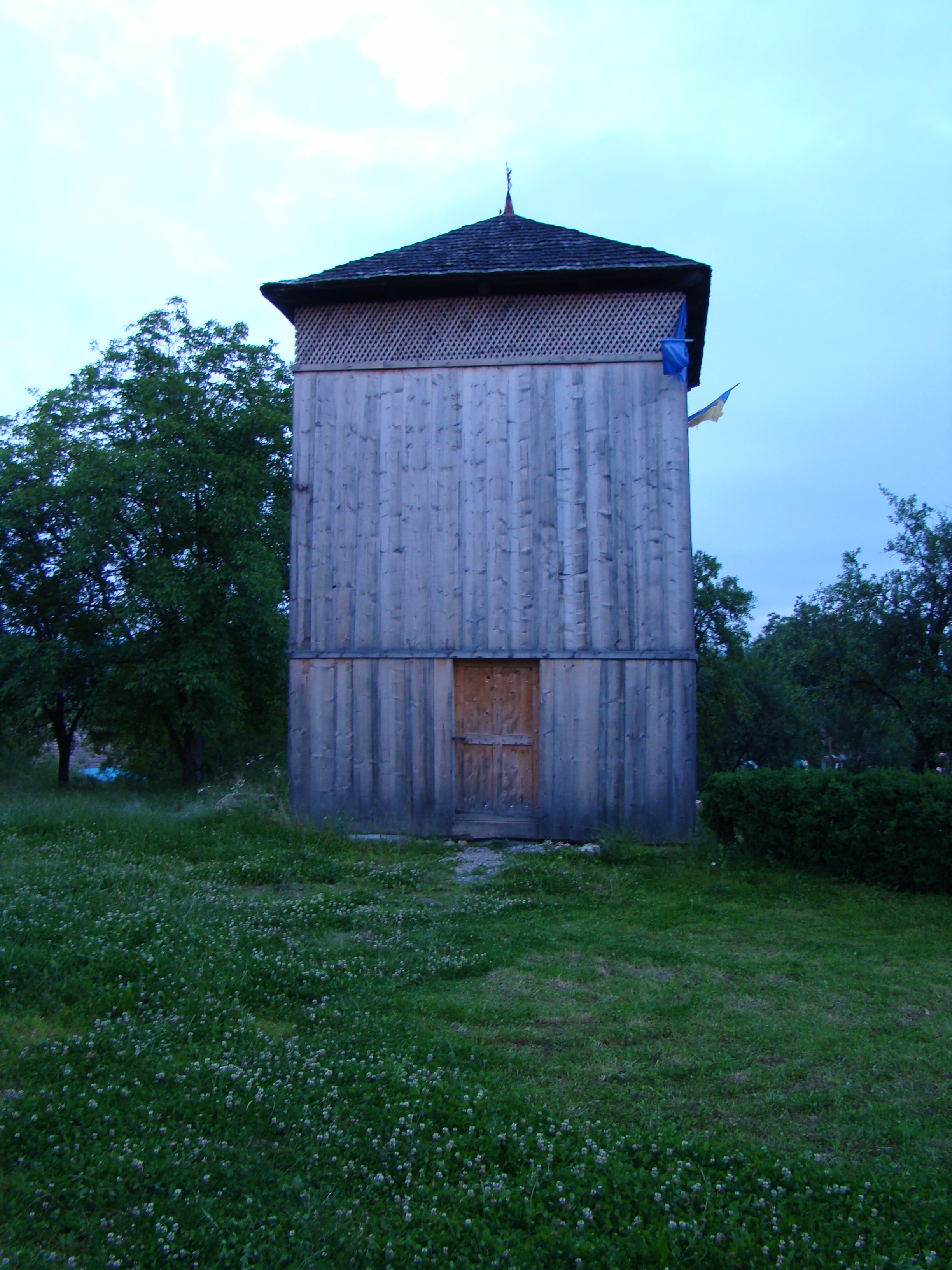 Biserica de lemn din Remetea Chioarului 02